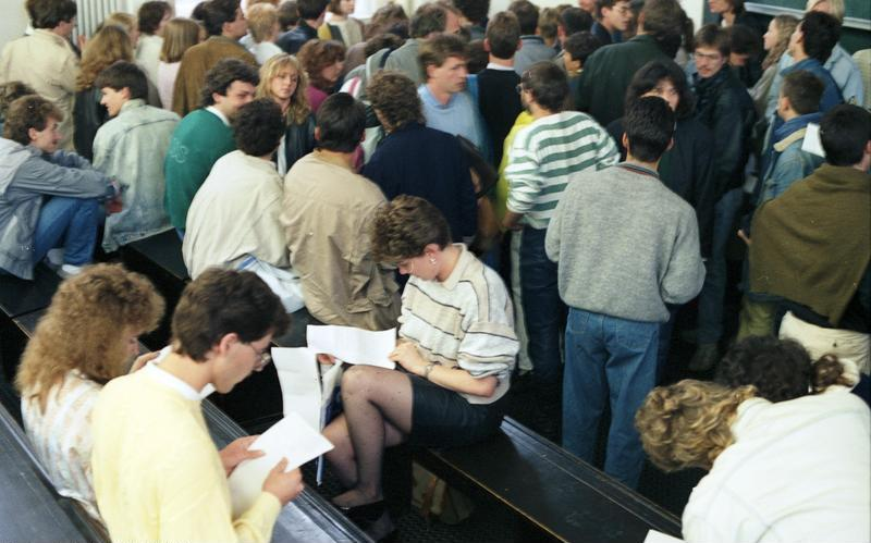 Juni 1988 Heidelberg Innenstadt Universität - Rückgabe korrigierter Klausuren